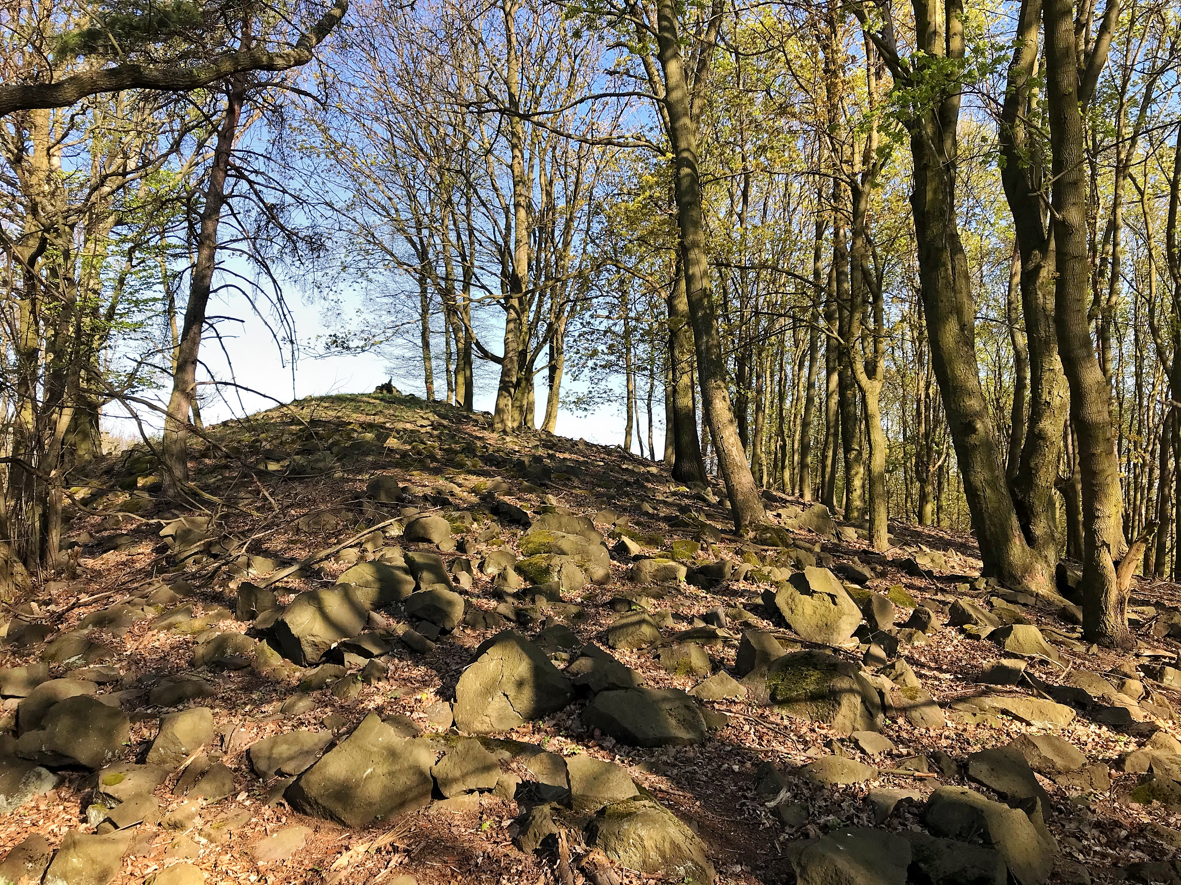 Vrchol Vaňovského vrchu (561 m) v Českém středohoří